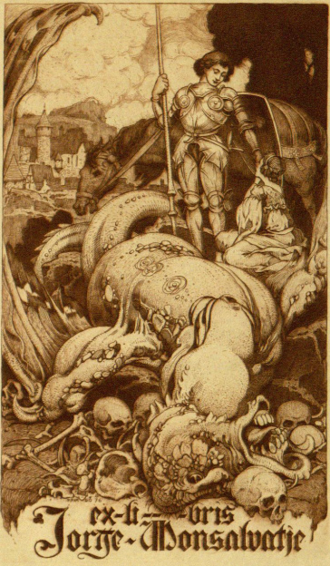 Ex-libris de Josep Triadó per a Jordi Monsalvatge, 1904